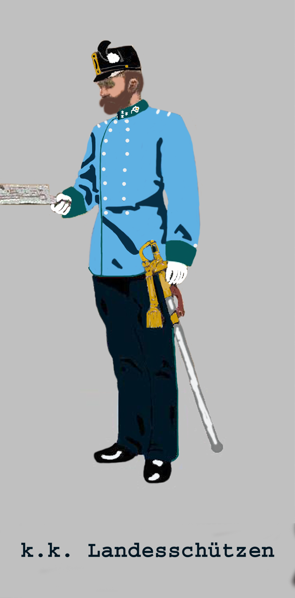 k.k. Hauptmann der Landesschützen in Dienst/Ausgangsadjustierung nach 1907/08.